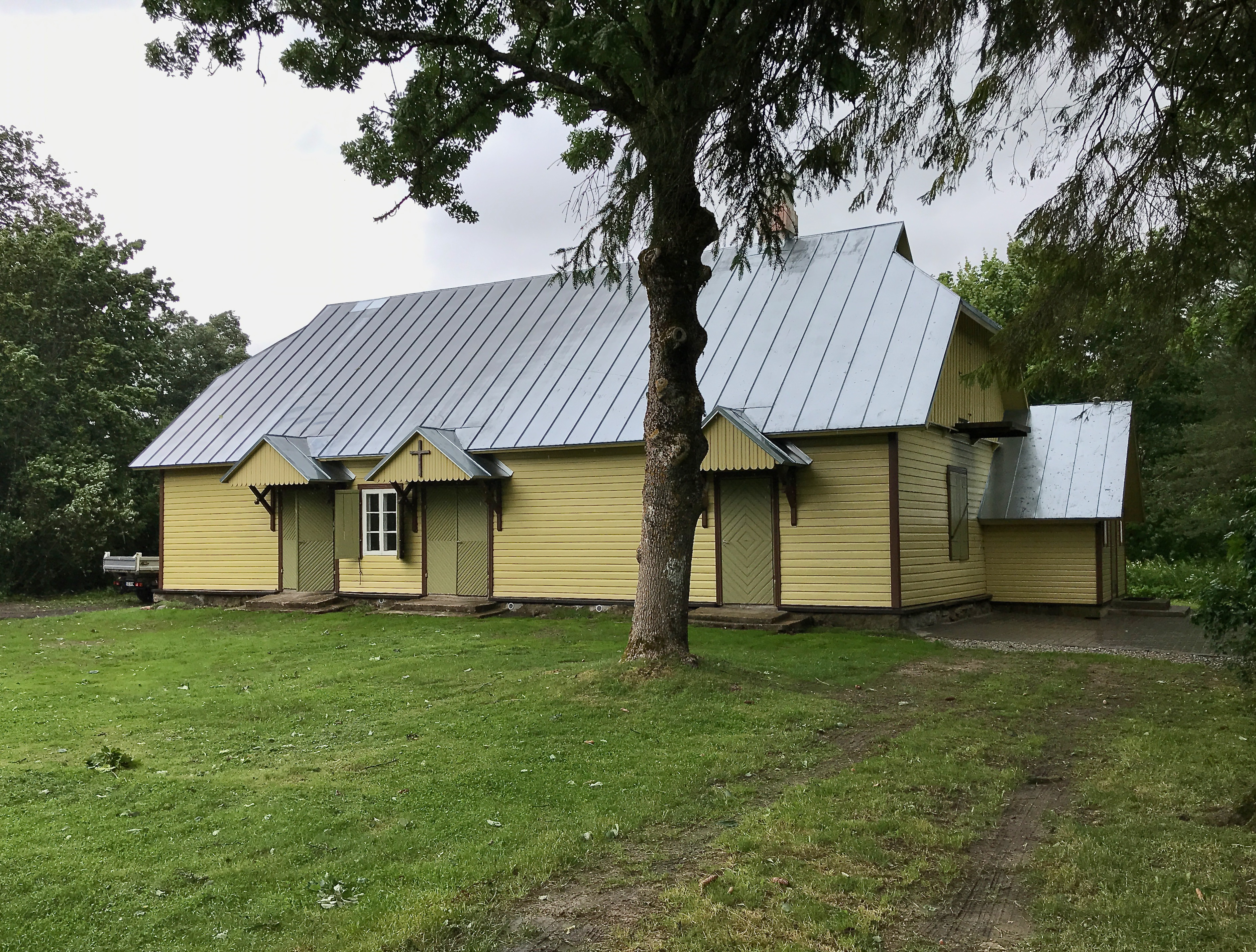 Nabala vennastekoguduse palvemaja